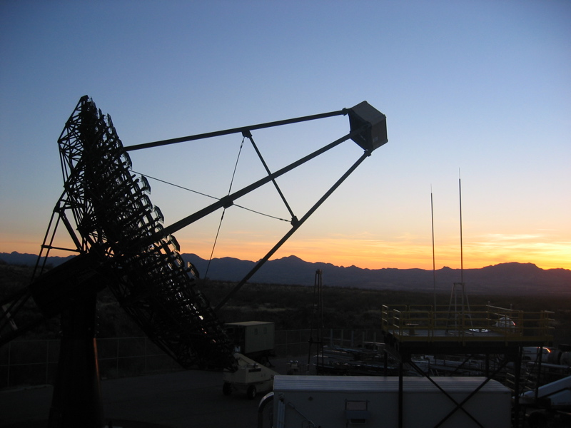 VERITAS Telescope 2 at Sunset (J. Perkins [1]).